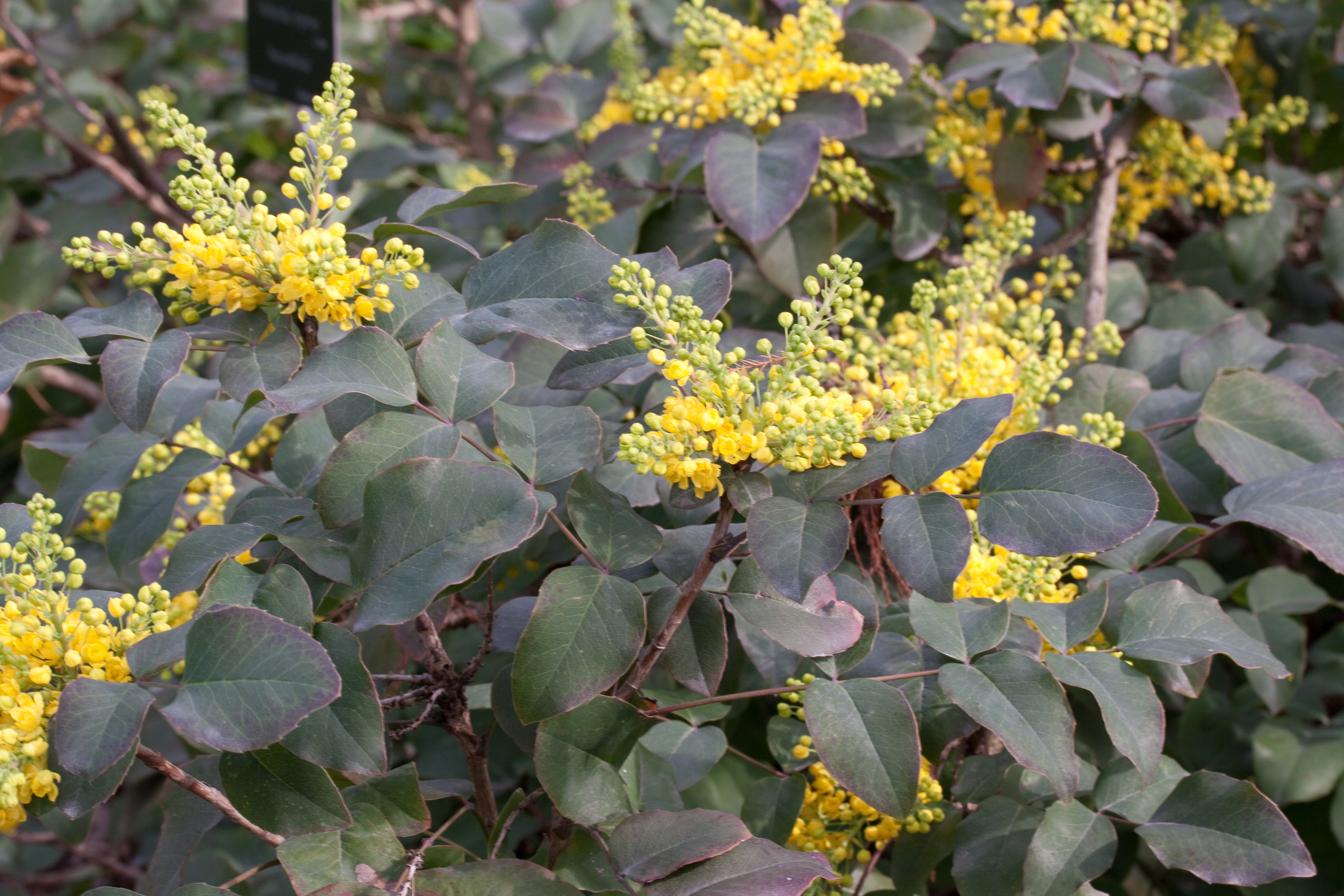 Berberis repens var. rotundifolia - Floraison - Jardin des Plantes - Paris